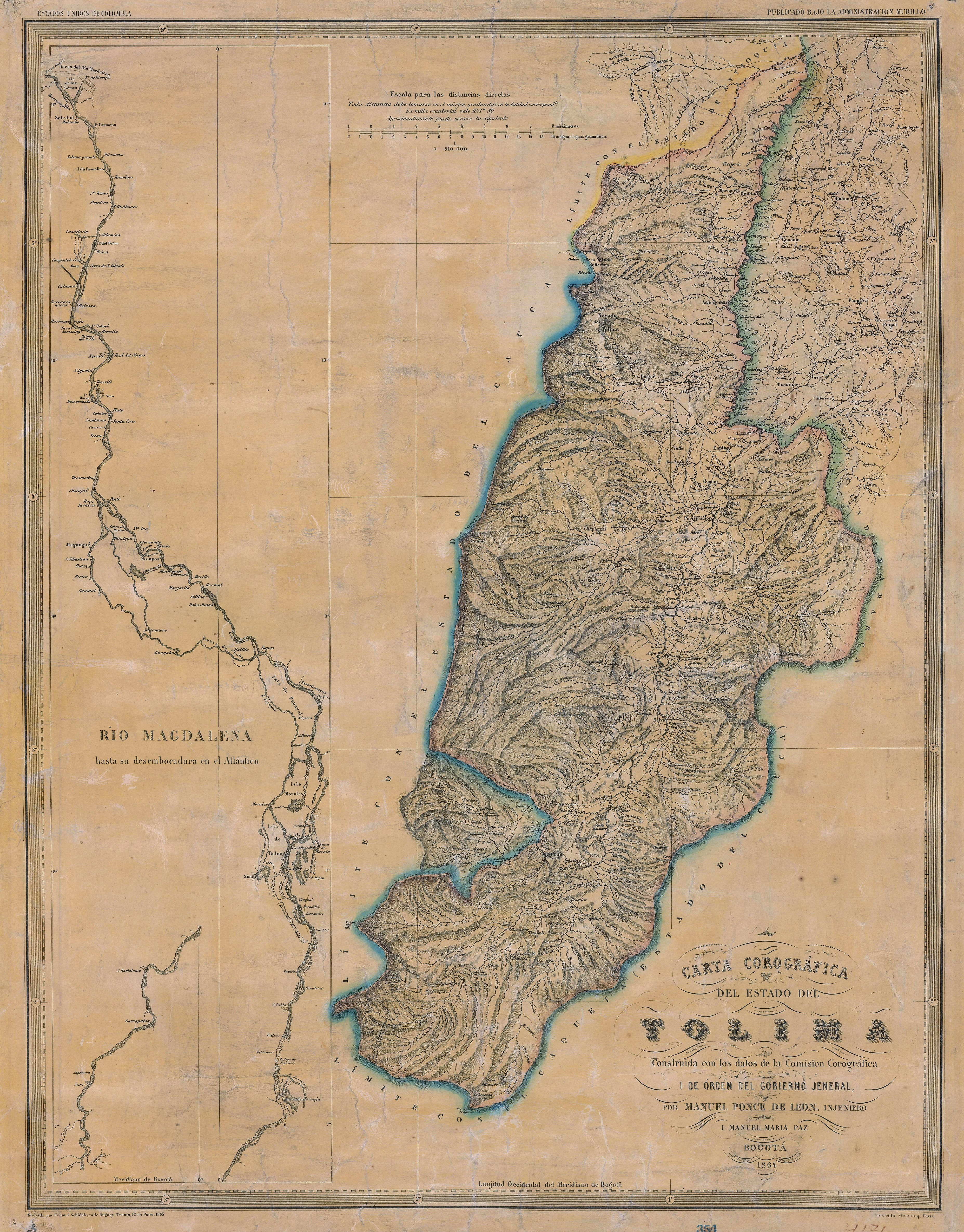 Carta Corográfica del Estado Soberano del Tolima. Tomado del "Atlas de los Estados Unidos de Colombia, antigua Nueva Granada", 1865.